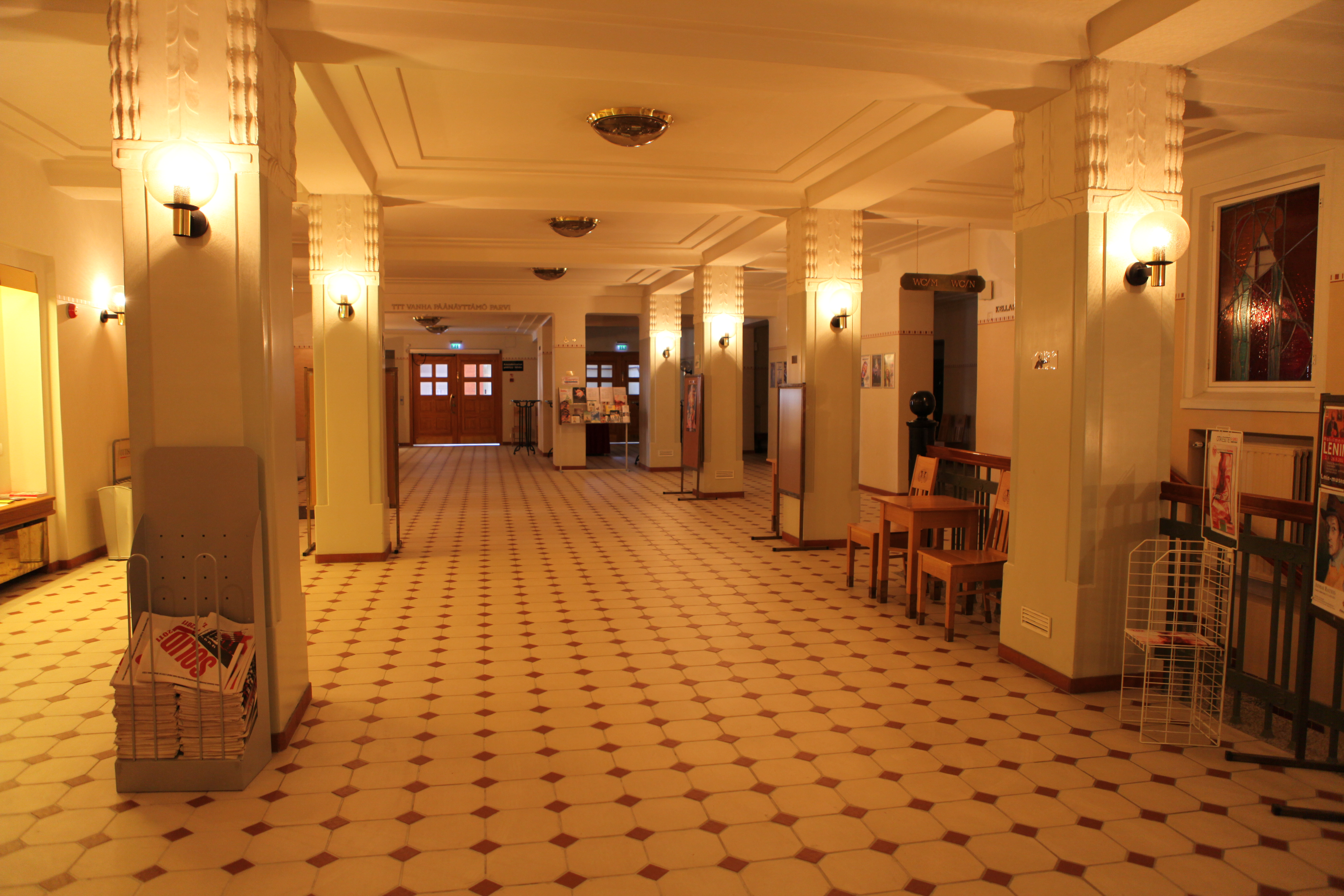 Description